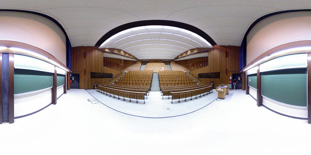 Panorama des Auditorium Maximum (Audi Max) der TU Wien (sphärische Darstellung)